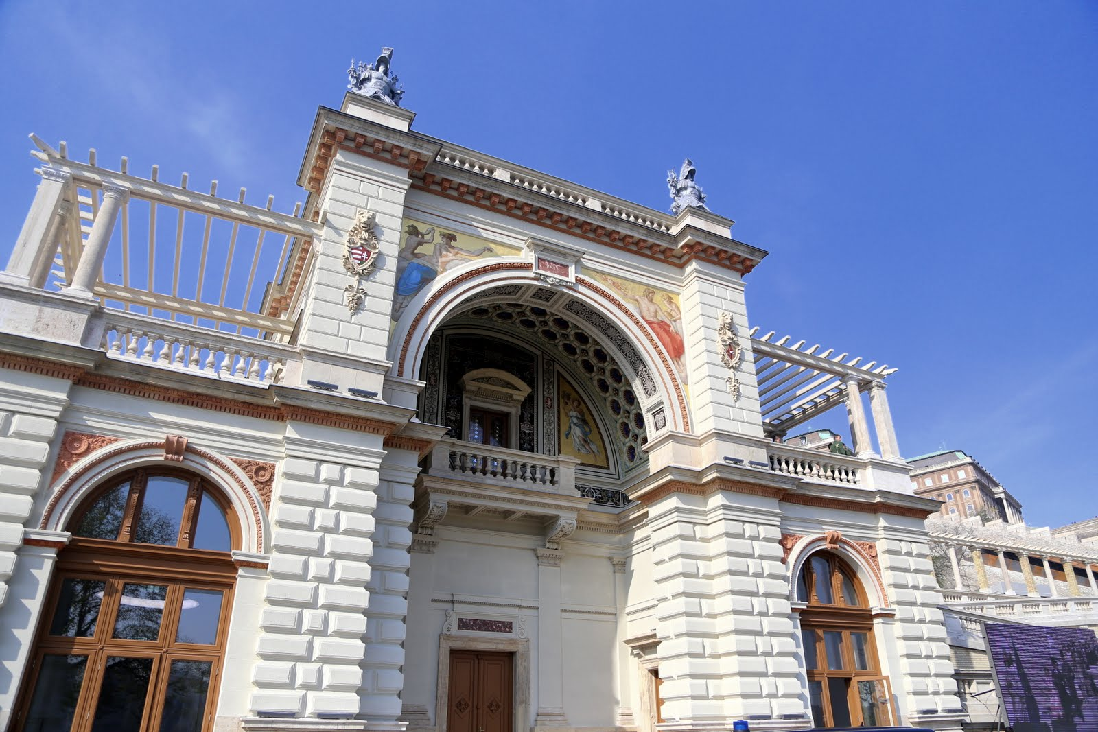 Várkert Bazár megnyitásakor, 2014.04.03.